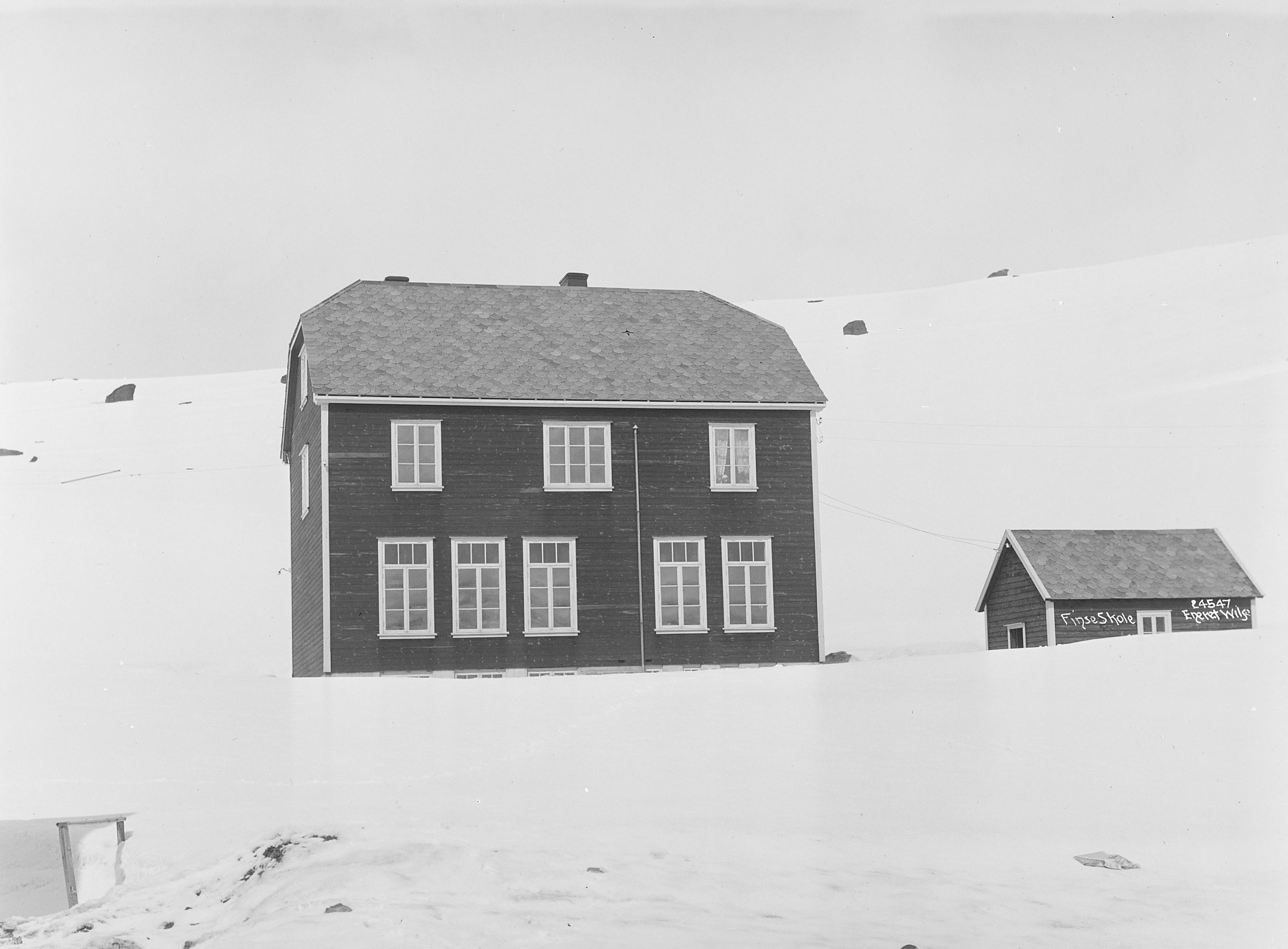 Finse skole fotografert av Anders Beer Wilse i 1924. I den er Finse kapell (vigslet 1963).